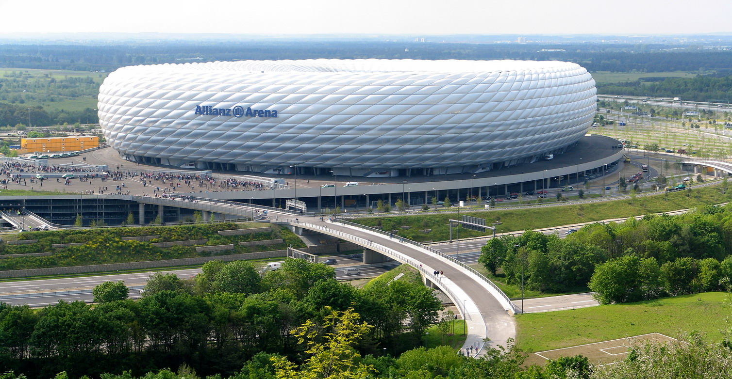 Panorama Aufnahme der Allianz Arena München am Tag des 1. Testspiels (19.Mai 2005)